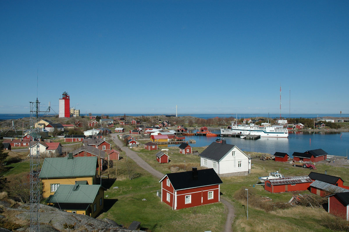 Utön saari kesällä 2005 puolustusvoimien merivalvonta-asemasta nähtynä. Laiturissa matkustaja-alus M/S Kristina Brahe.